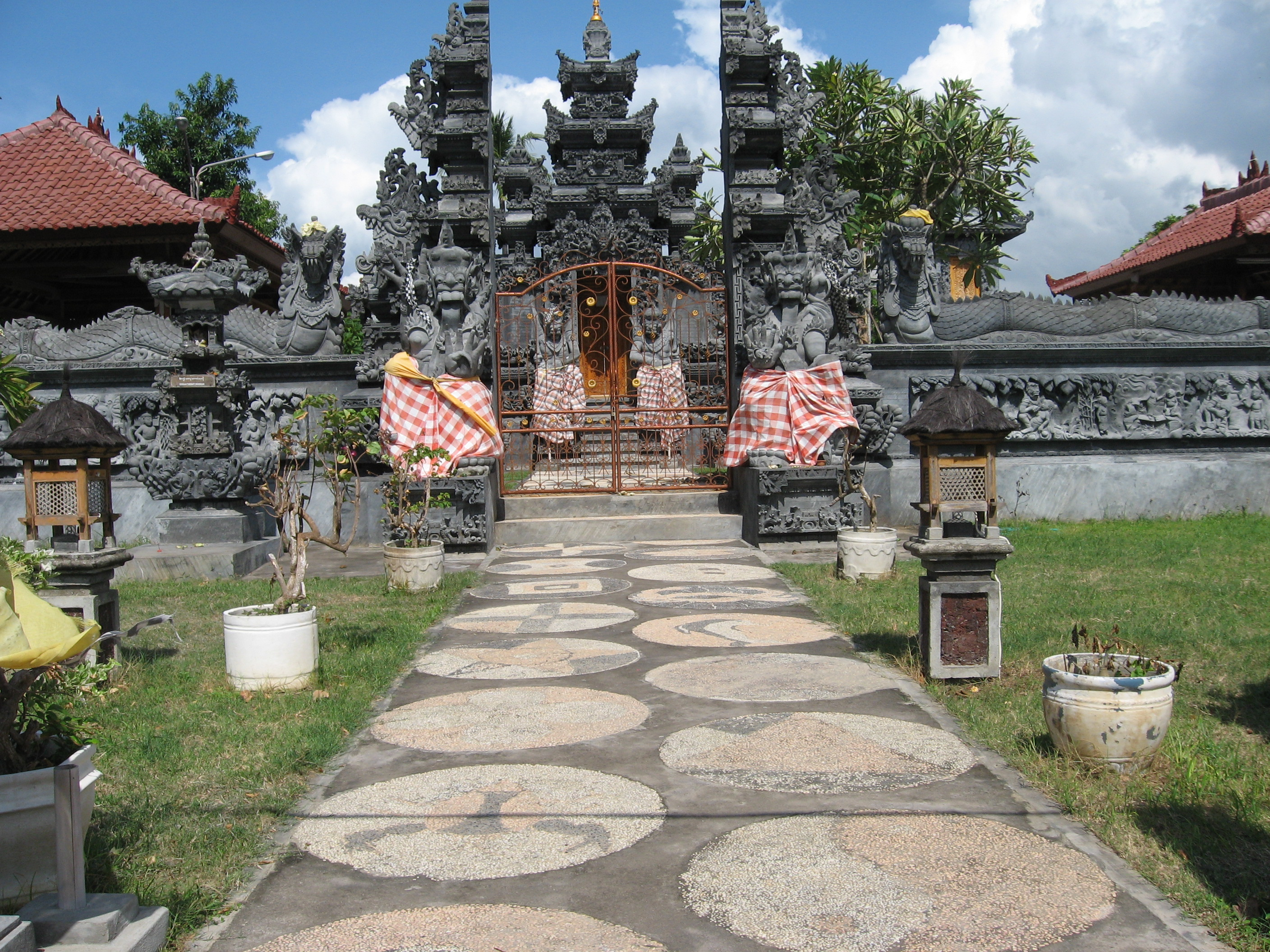 Temple om Beach (Pantai Lovina)